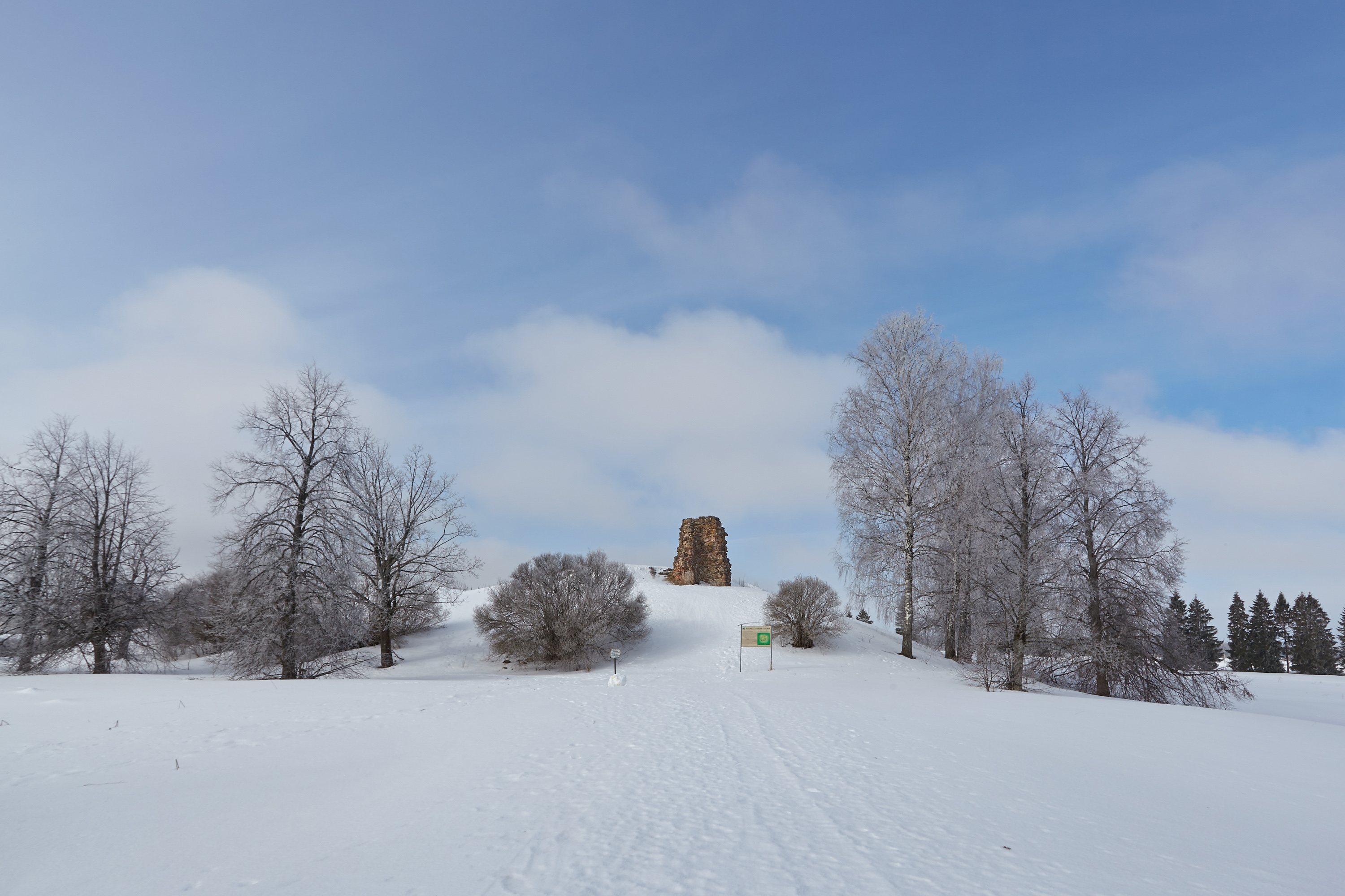 Kirumpää piiskopilinnus 2013. aasta märtsis